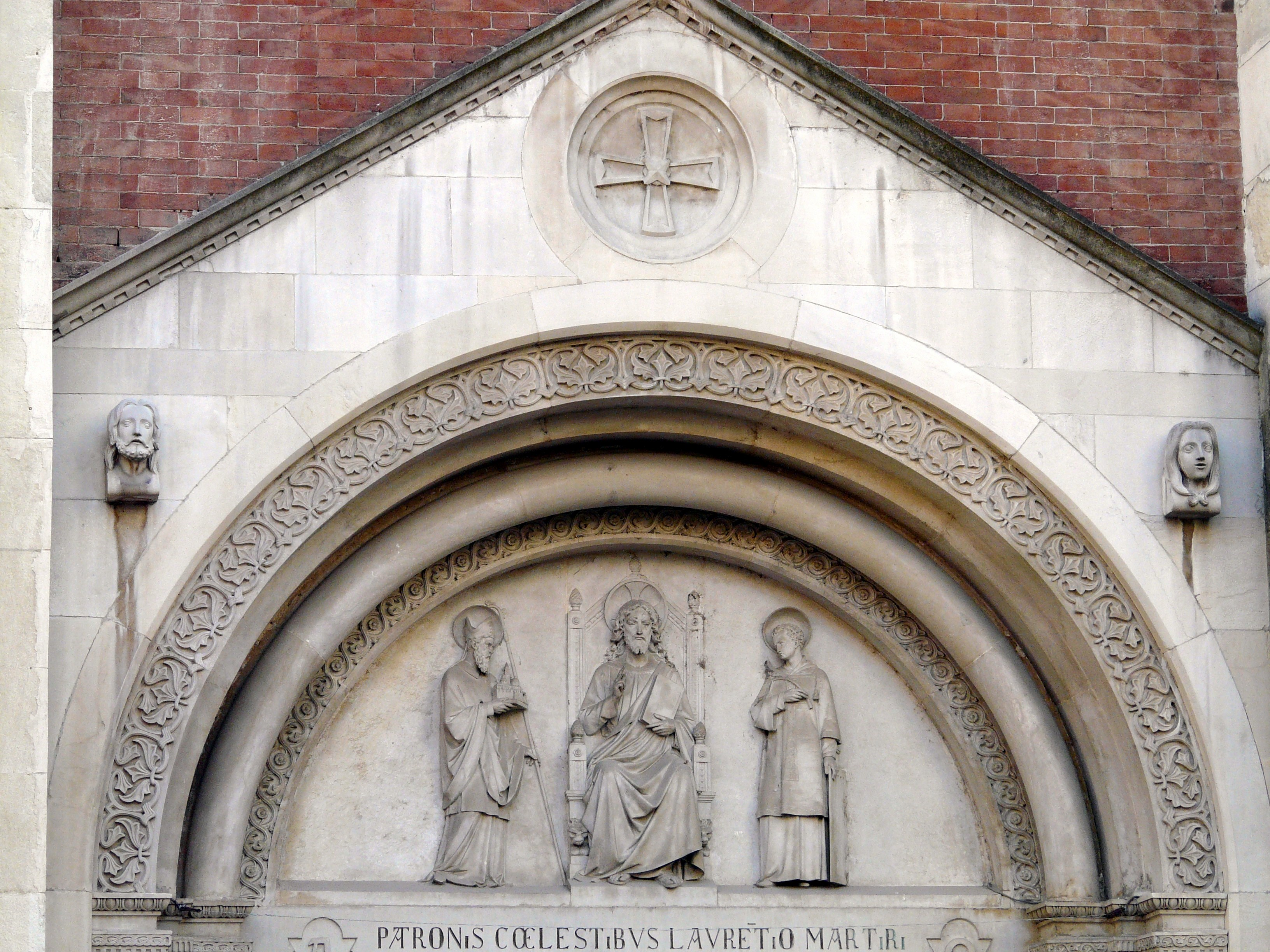 Facciata della cattedrale di Sant'Evasio, Casale Monferrato, Piemonte, Italia